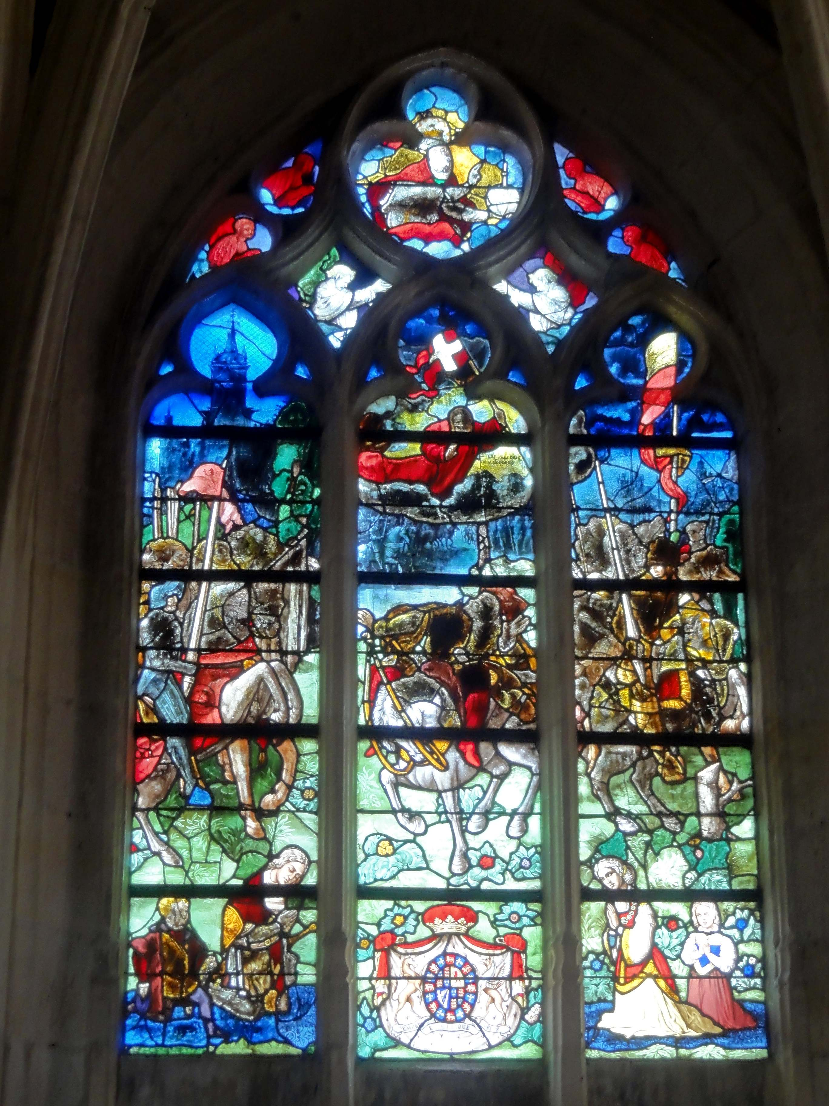 Verrière n° 5 : la Conversion de saint Paul sur le chemin de Damas.